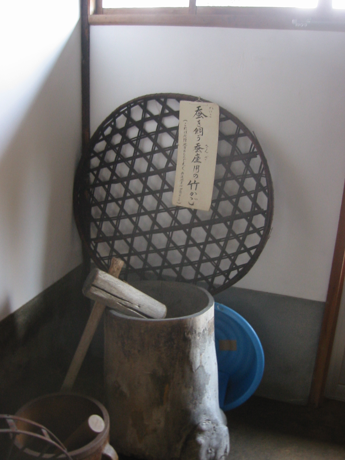 篠山市立青山歴史村